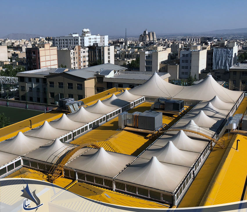 سقف پارچه ای وید و راهرو های مرکز خرید جنت آباد